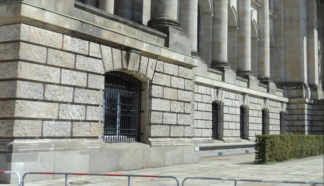 Reichstagsgebäude - West - Ecke - links - Sockel Platz der Republik Baudenkmal